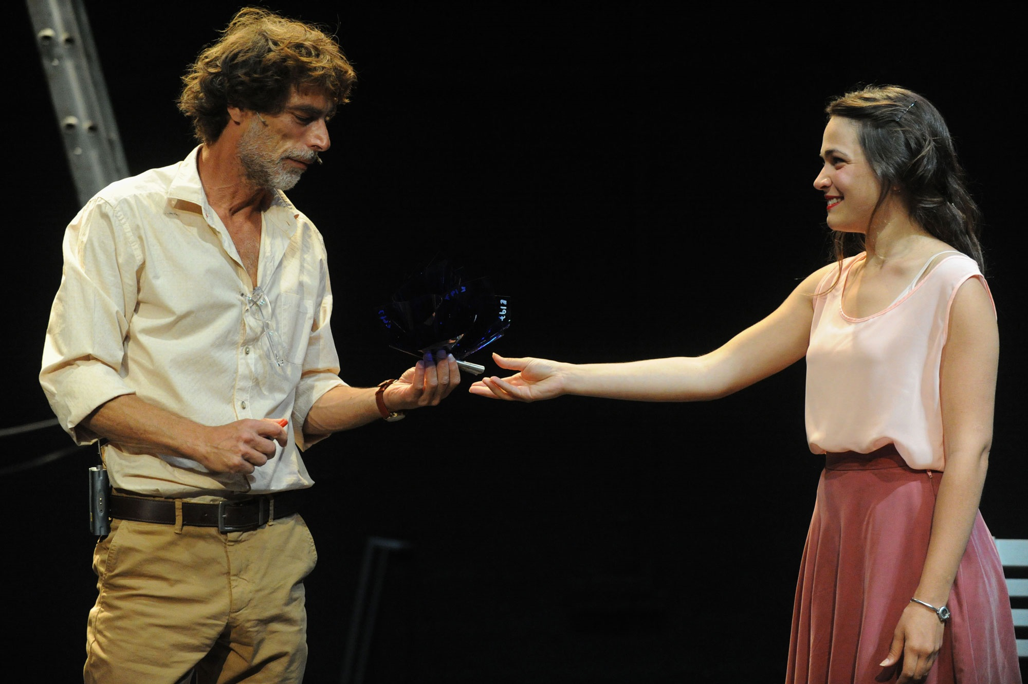 גאיה שליטא-כץ ויורם יוספסברג, השחף, תמונע, צילום - גדי דגון, 2013